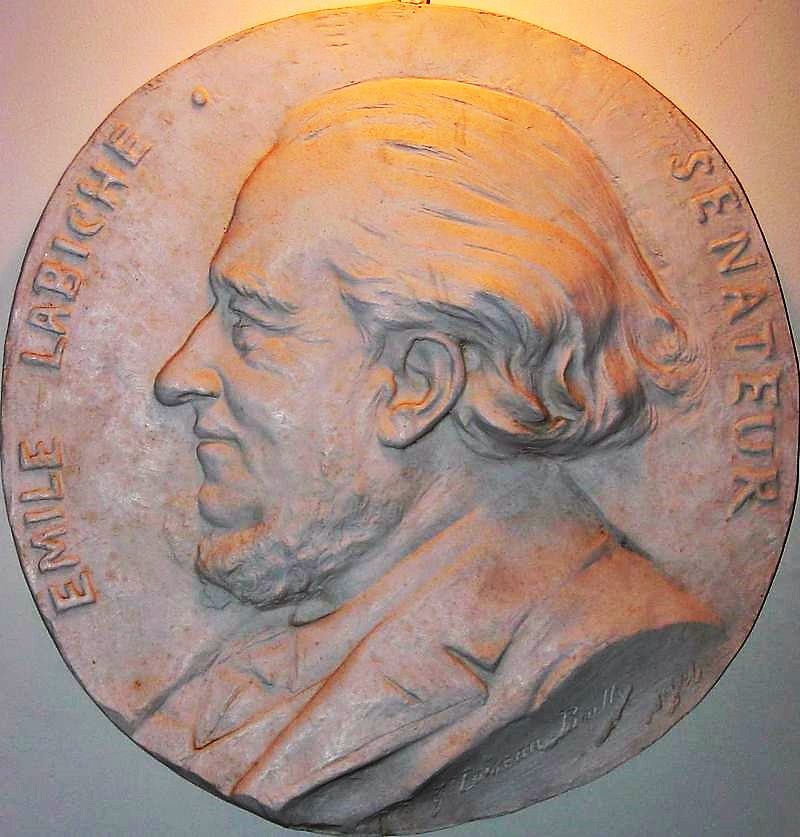 Portrait d'Émile Labiche.